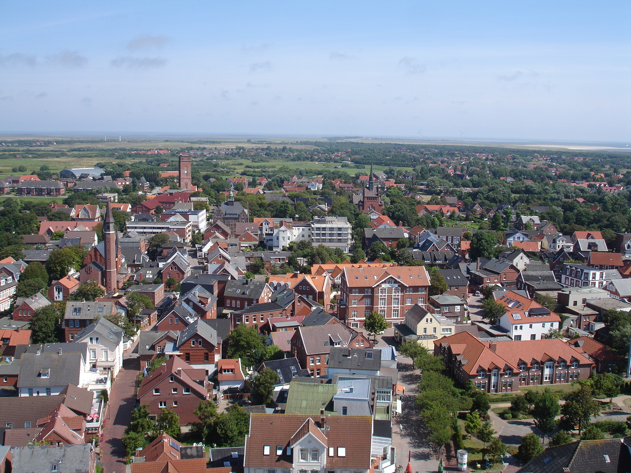 Stadt Borkum fan Nije Ljochttoer ôf